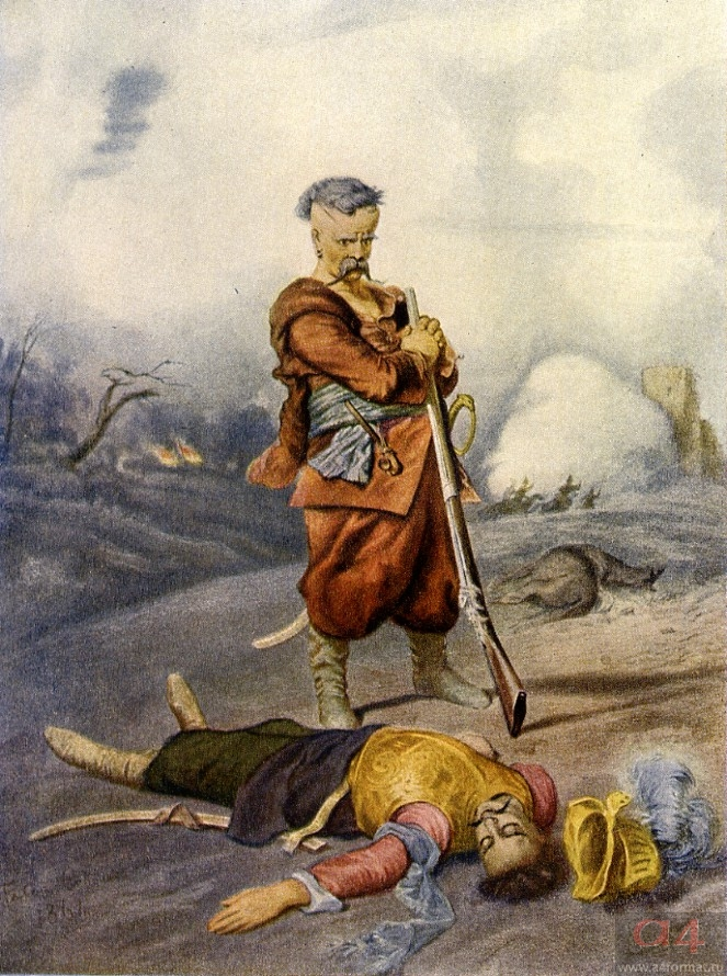 Иллюстрация к роману «Тарас Бульба».